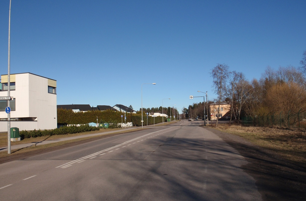 Kloostrimetsa tee Lepiku teega ristumise kohas